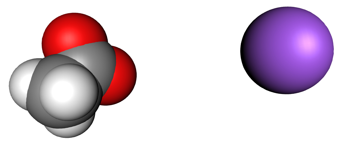 Molviewにより作成。